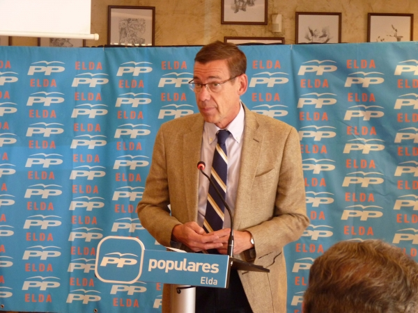 Antonio Clemente visita Elda (País Valencià) l'octubre de 2010.